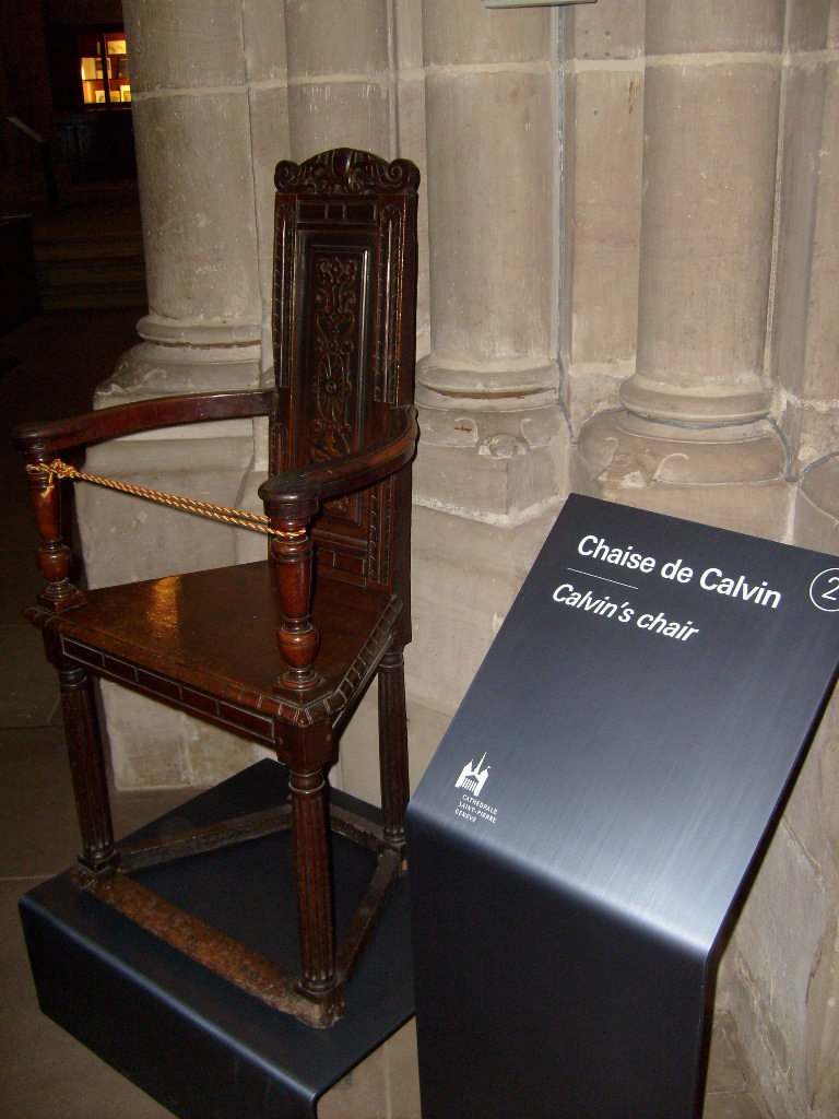 Chaise de Jean Calvin dans la cathédrale Saint-Pierre de Genève (Suisse)